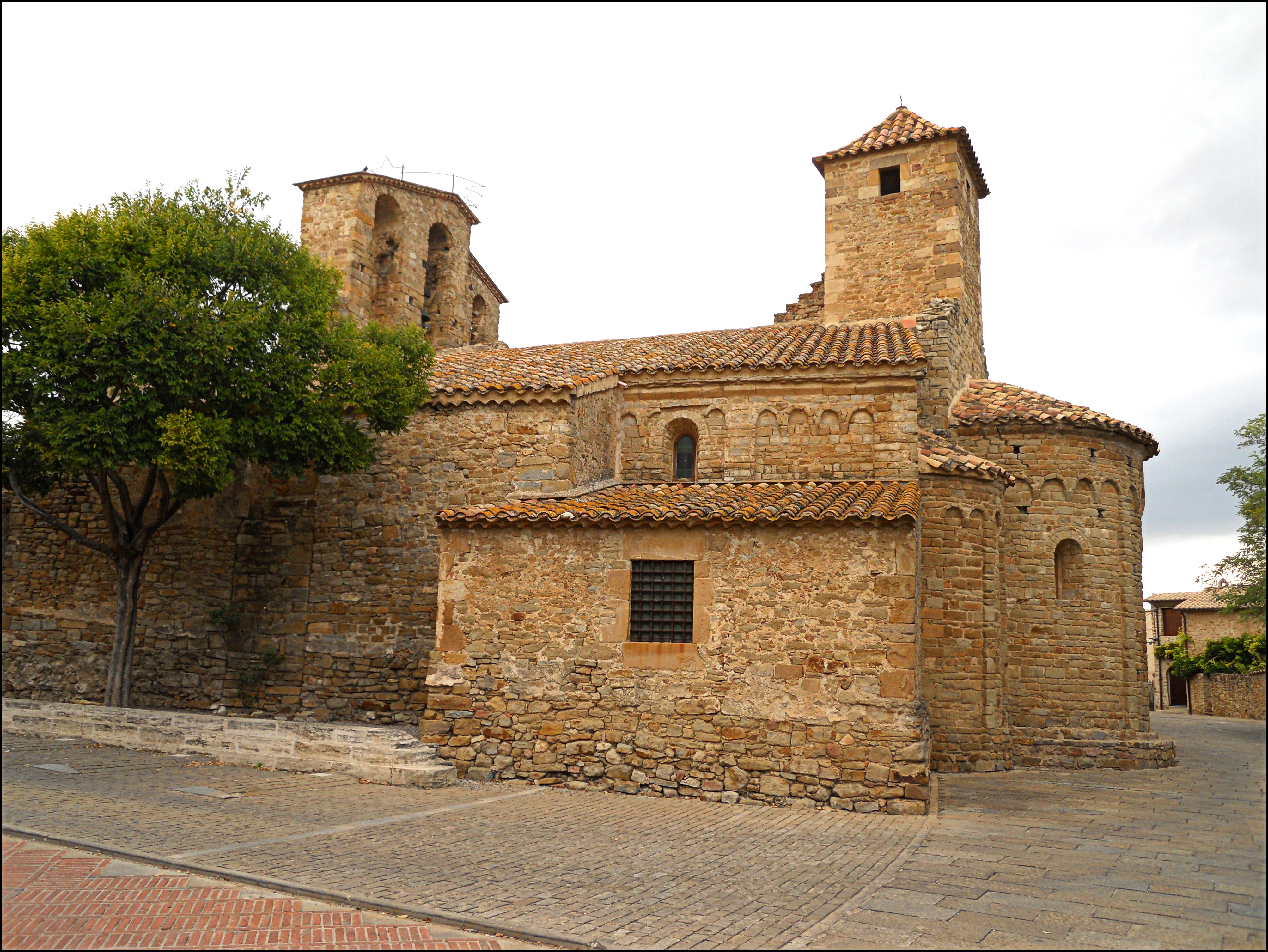 Eglise d'Ullastret (2)